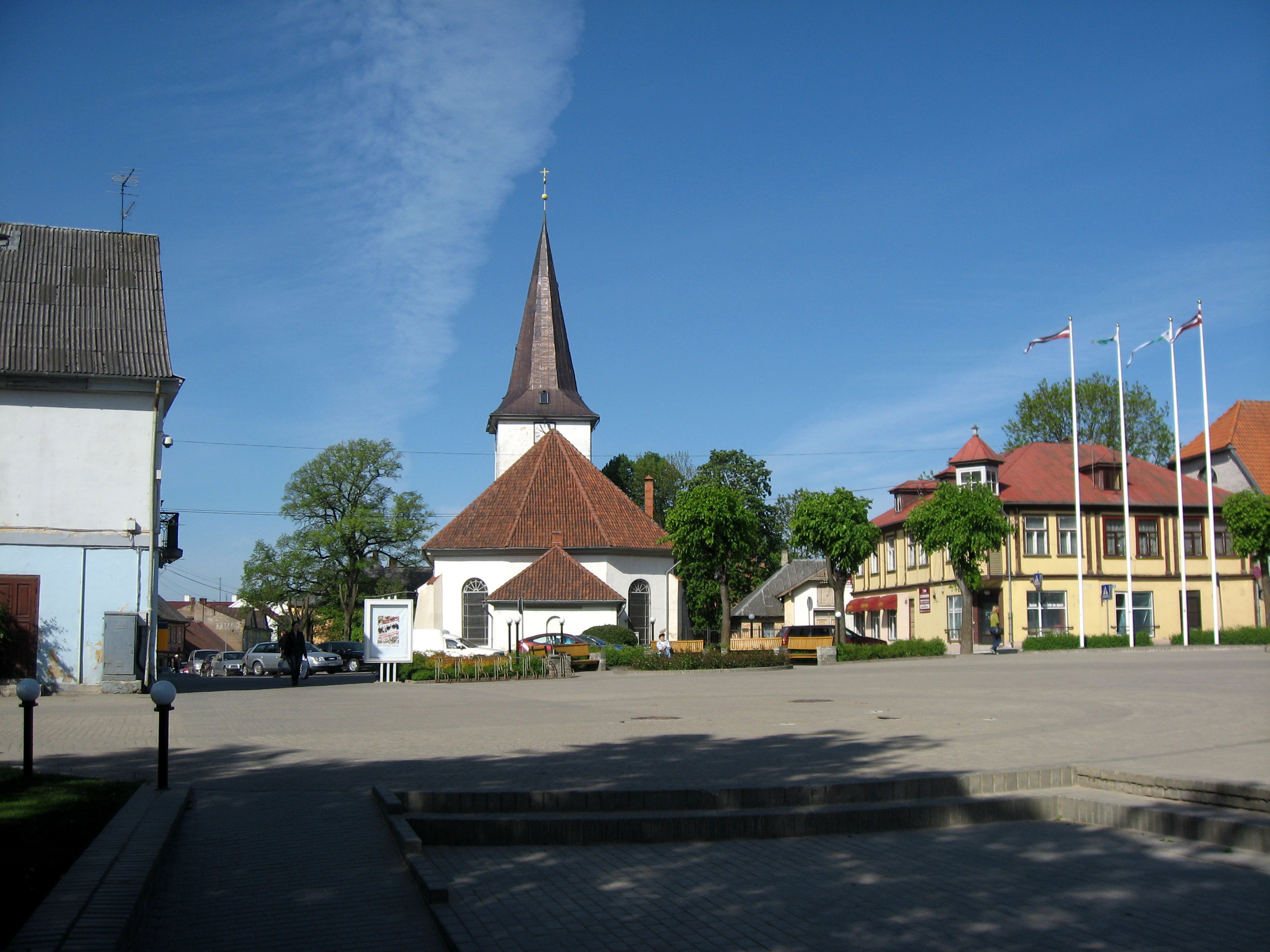 Tukums